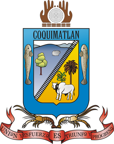 Escudo de Coquimatlan